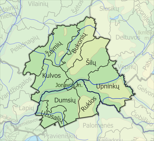 Padaryta iš lt::image:LietuvosSeniunijos.png